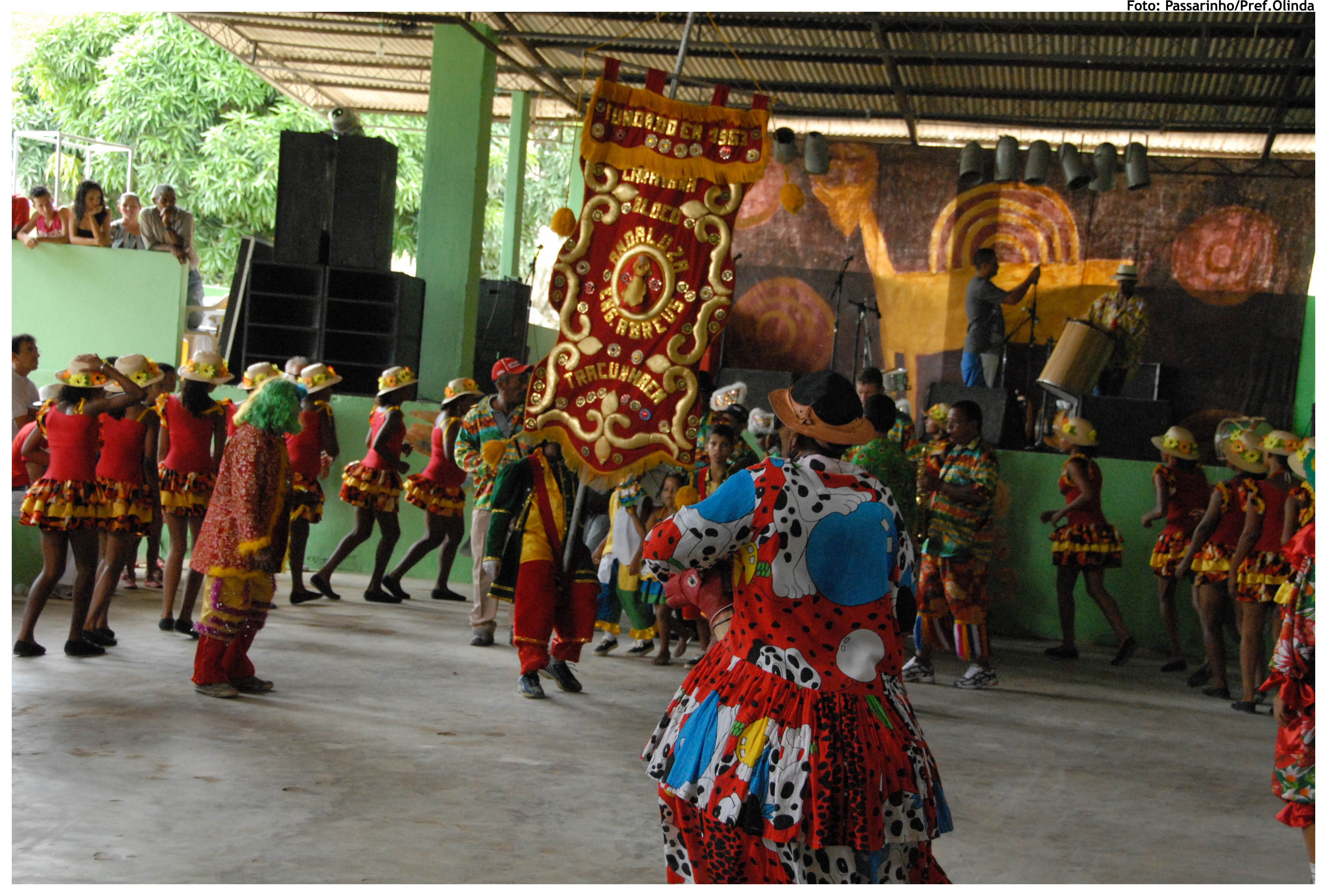 Foto: Passarinho/Pref.Olinda